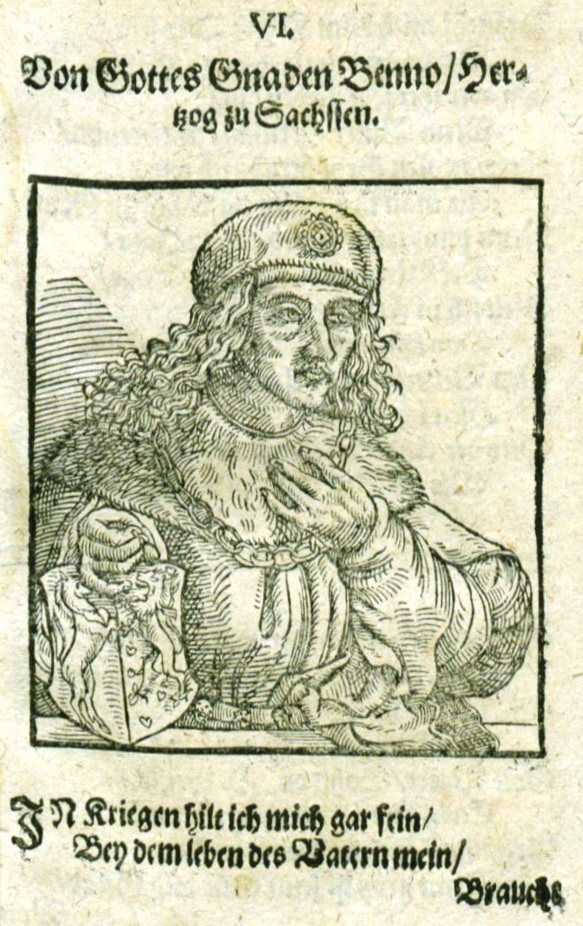 Bildnis Bernhard I. von Sachsen († 9. Februar 1011)